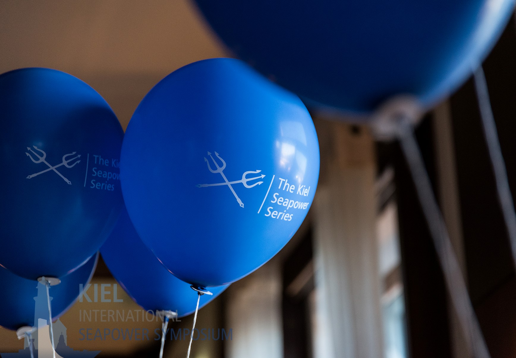 Stilleben beim Kiel International Seapower Symposium 2018.